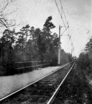 Ved stoppestedet Ekebergparken ved Jomfrubråten, på sidesporet til Simensbråten.